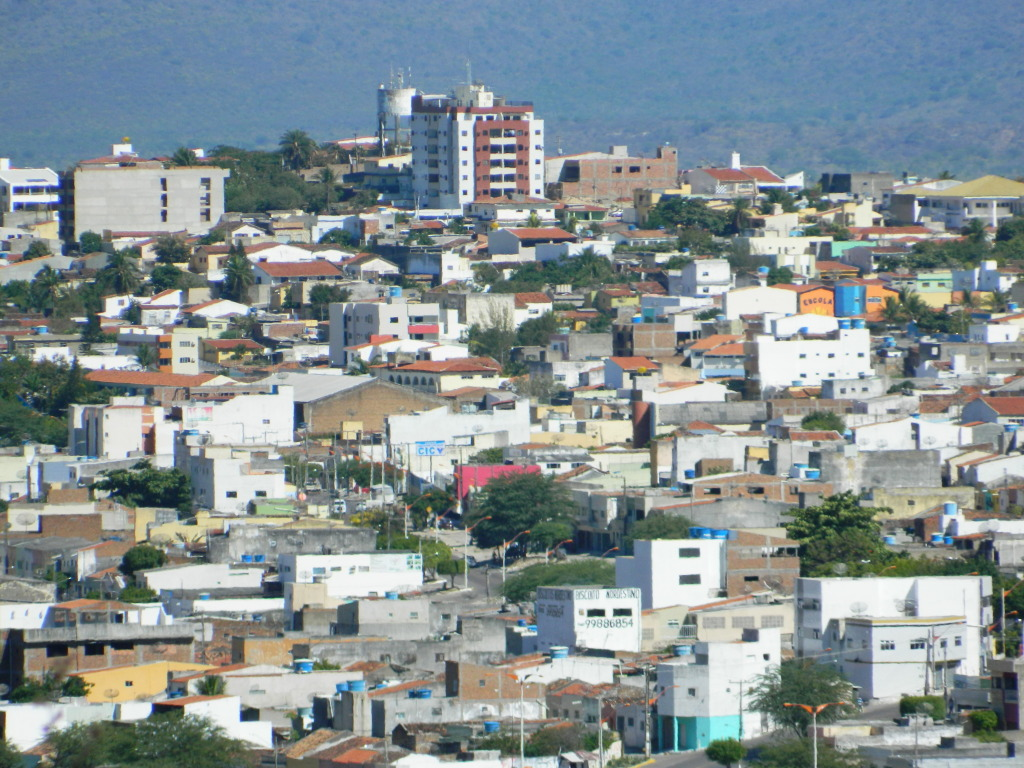 Arcoverde-Pernambuco